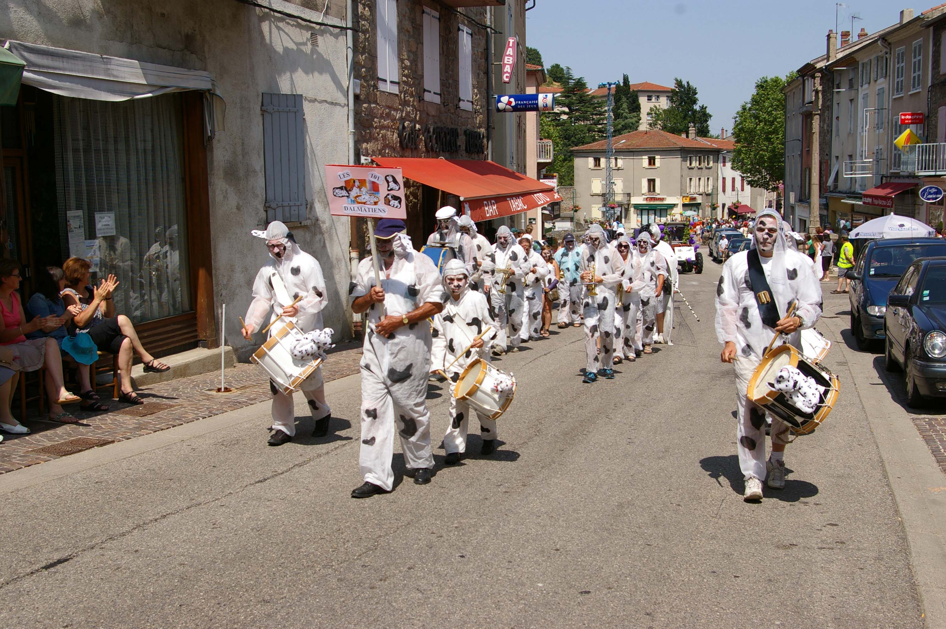 Satillieu 14 juillet 2013